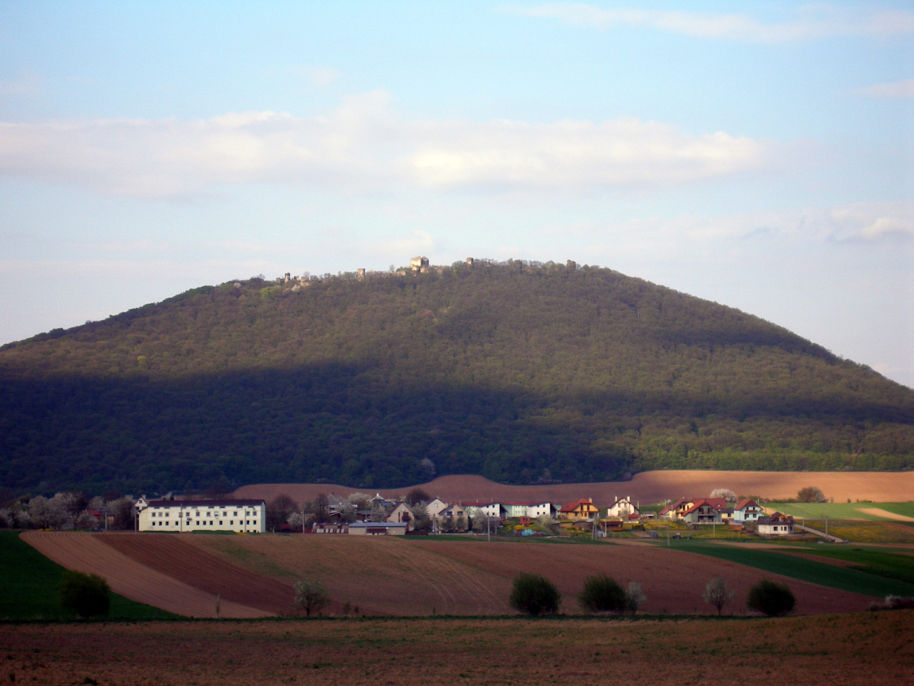 Obec Medzany okres Prešov región Šariš